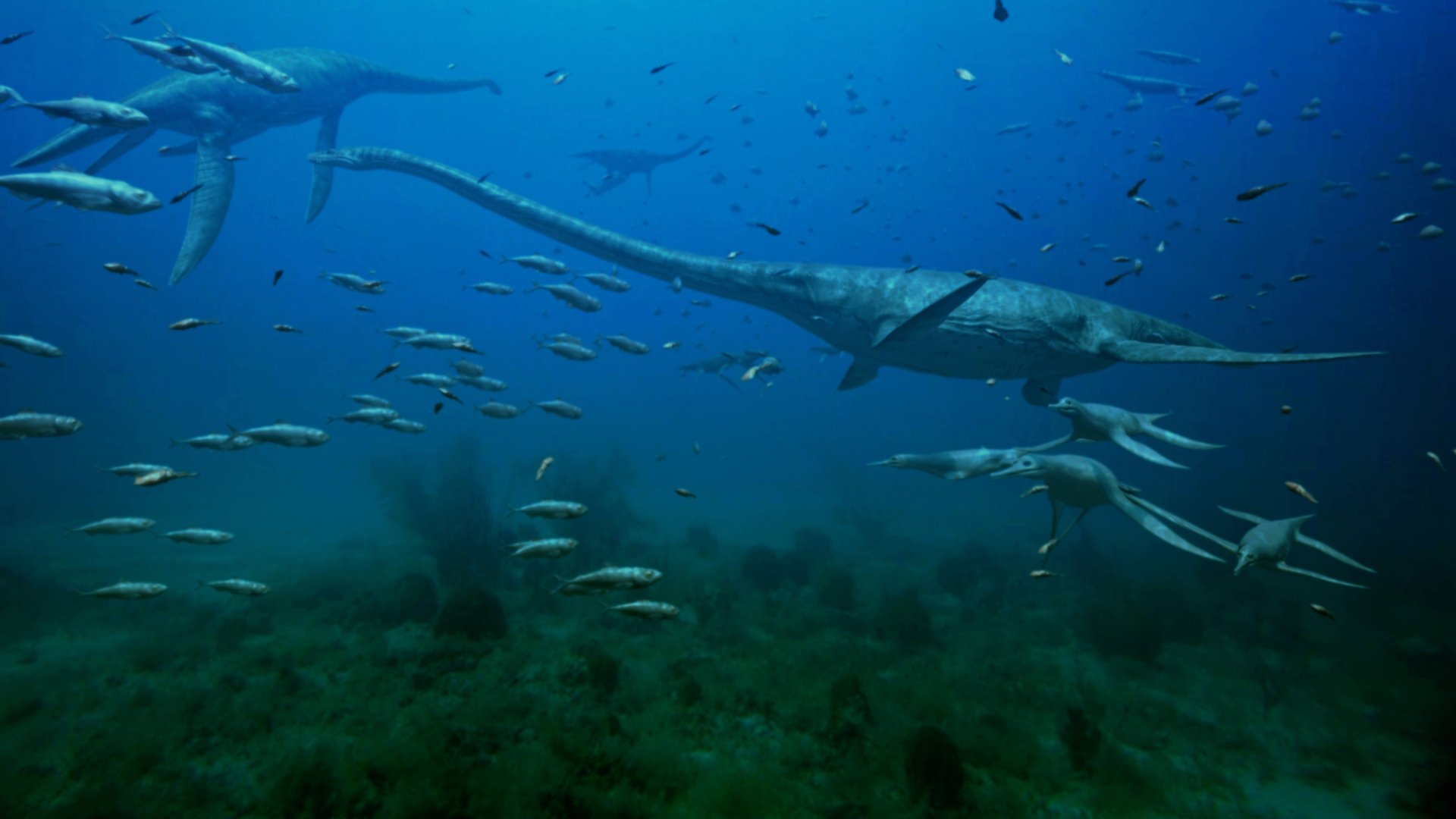 styxosaurus